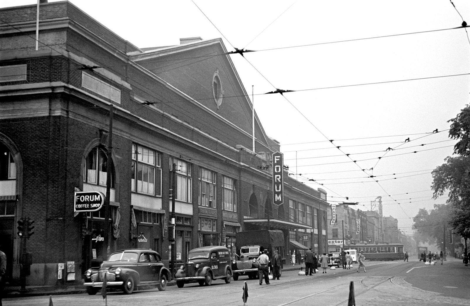 Forum de Montréal, rue Sainte-Catherine Ouest / avenue Atwater